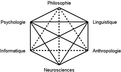 Représentation symbolique des liens interdisciplinaires entre les sciences constitutives du domaine des sciences cognitives. Les traits pleins représentent les liens qui existaient aux premiers temps des sciences cognitives, jusqu'en 1978 ; les traits pointillés représentent les liens interdisciplinaires qui se sont développés depuis. D'après Keyser, S.J., Miller, G.A., and Walker, E., Cognitive Science in 1978. An unpublished report submitted to the Alfred P. Sloan Foundation, New York